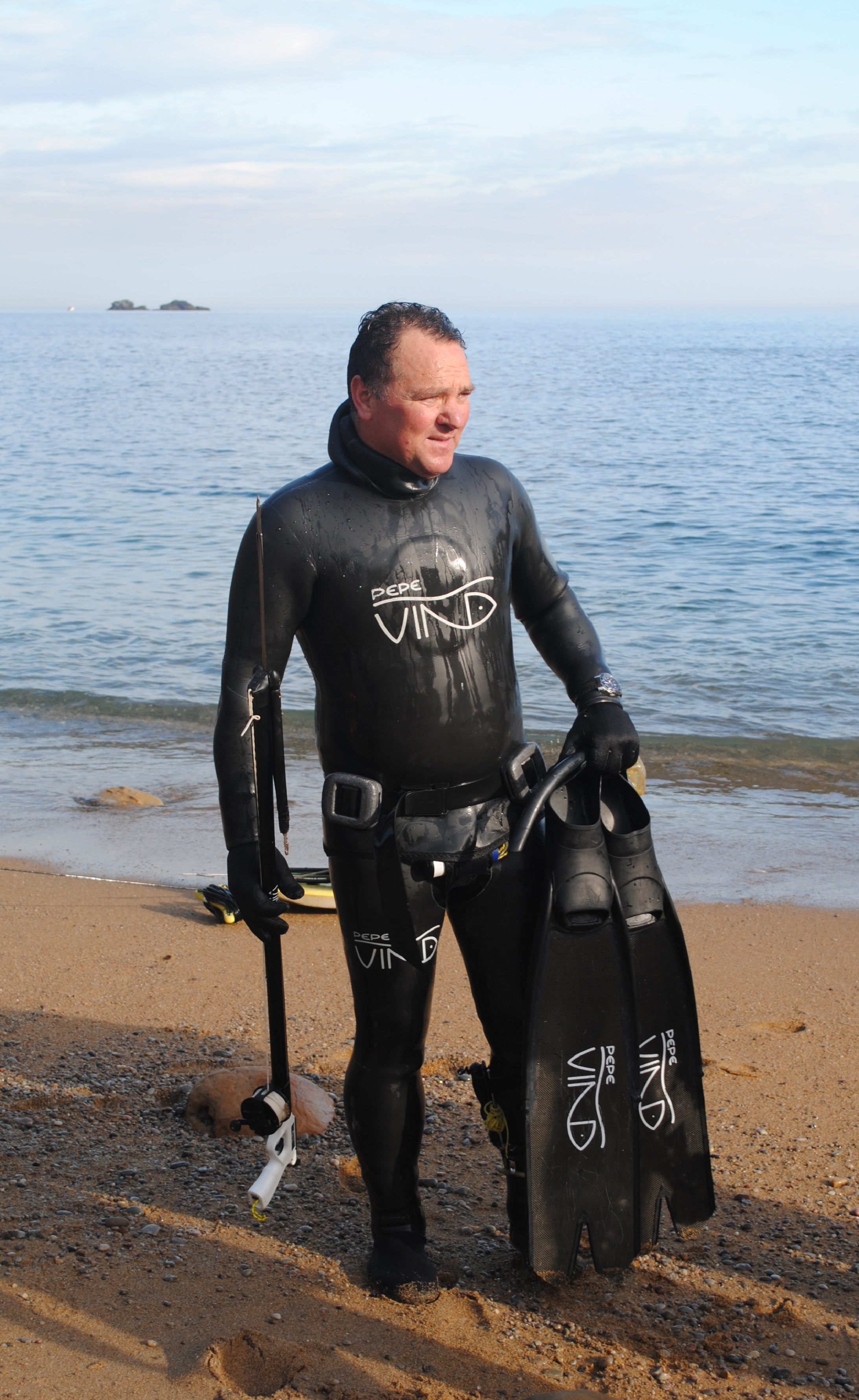 Pepe Viña en la orilla del mar